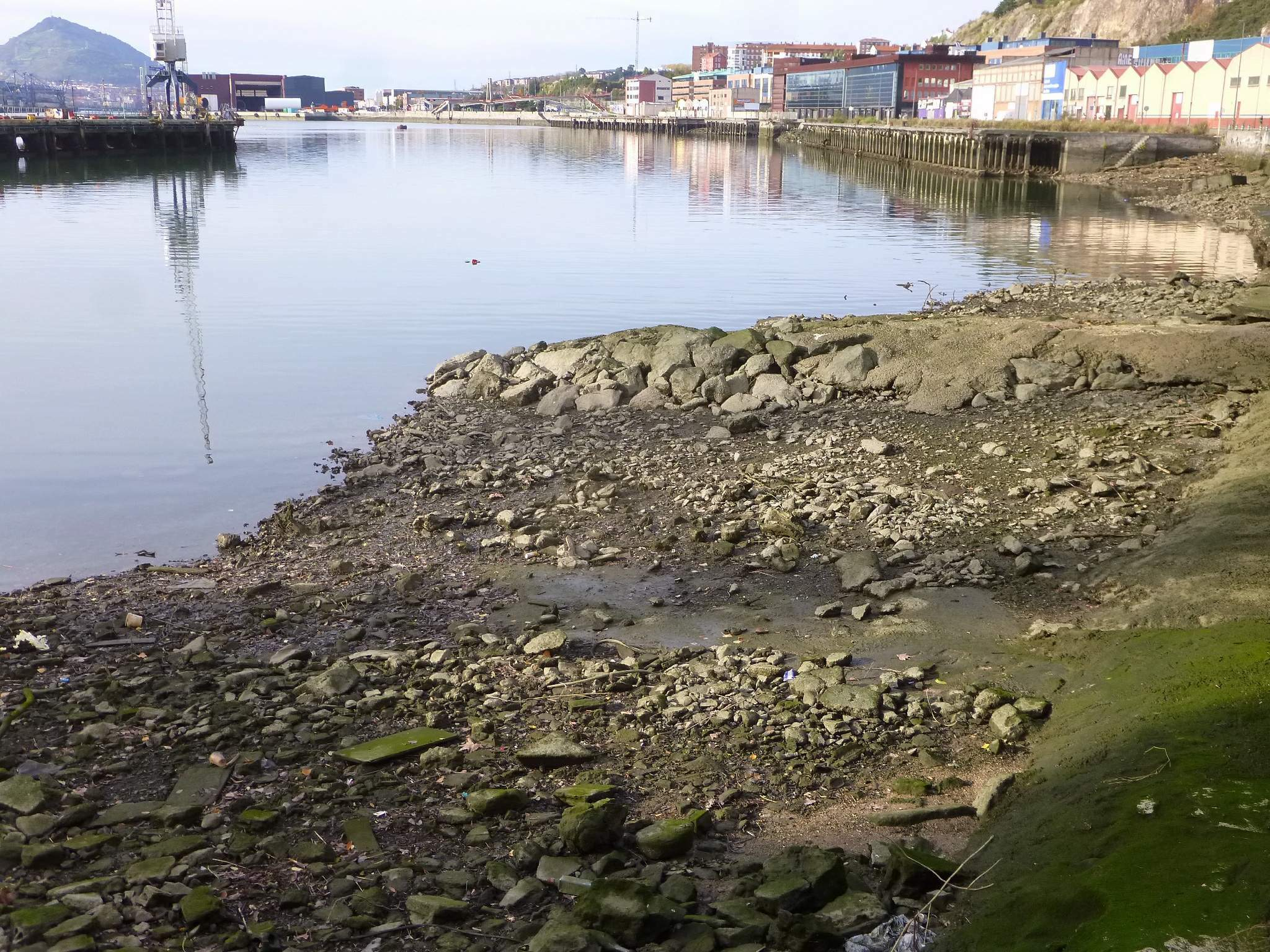 La Ría de Bilbao a la altura de Astrabudua (Erandio)